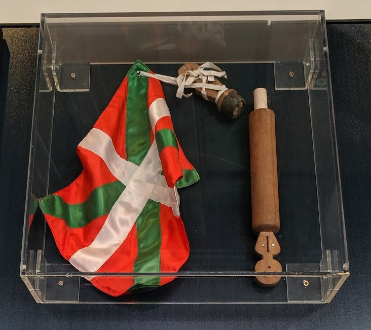 Remigio Mendibururen artelana, 1980ko Korrikaren lekukoa alegia, Donostiako San Telmo Museoaren erakusketa iraunkorrean dago ikusgai, "modernitatearen hasiera" deritzon atalean.